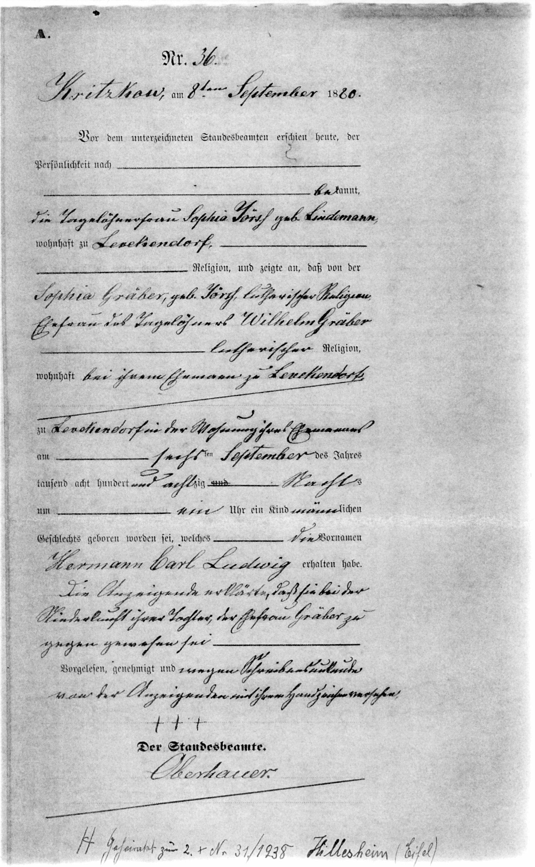 Standesamtliche Geburtsurkunde des Hermann Carl Gräber, der am 06.09.1880 zu Levkendorf, Kirchspiel Kritzkow, zur Welt kam.